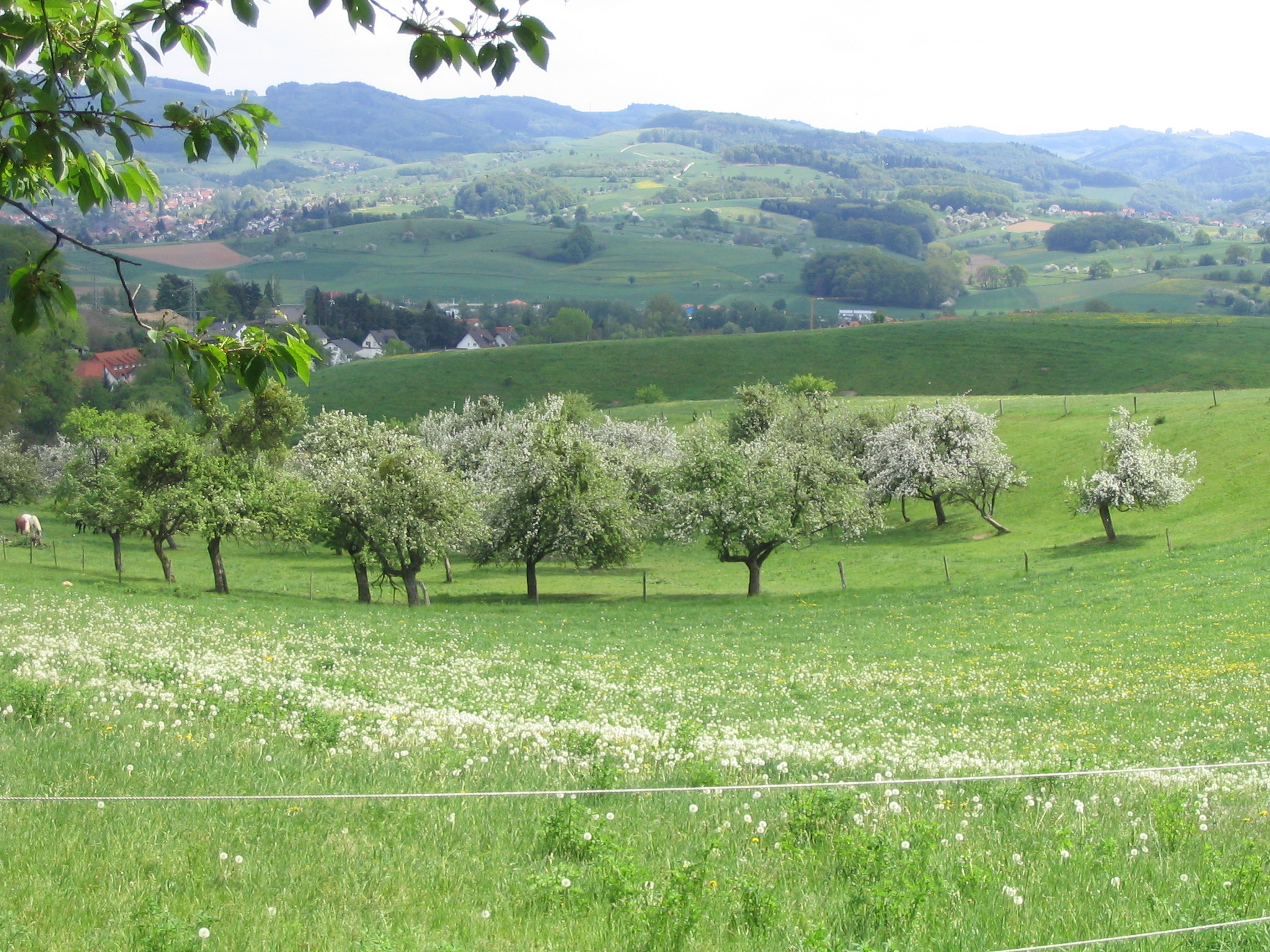 Blick vom Steinböhl über das Groß-Breitenbacher- und das Weschnitz-Tal zum Tromm-Gebirgszug (Odenwald): links Zotzenbach und der Trommgranit-Rücken bis zum Schimmelberg (492 m) in der Mitte, rechts der Buntsandstein-Hardberg und der Granodiorit/Granit-Götzenstein (522 m)